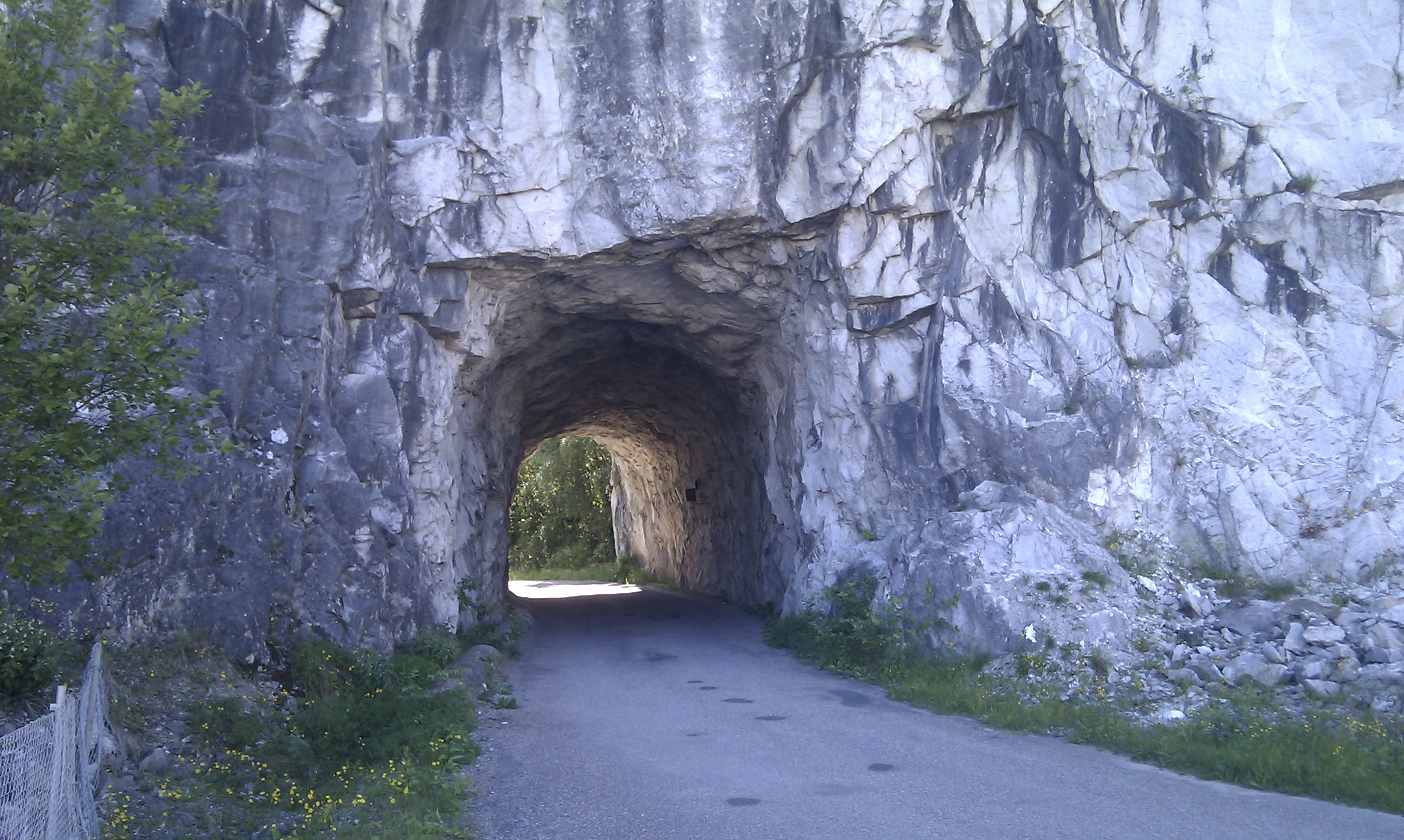 Vägtunneln på ön Oaxen